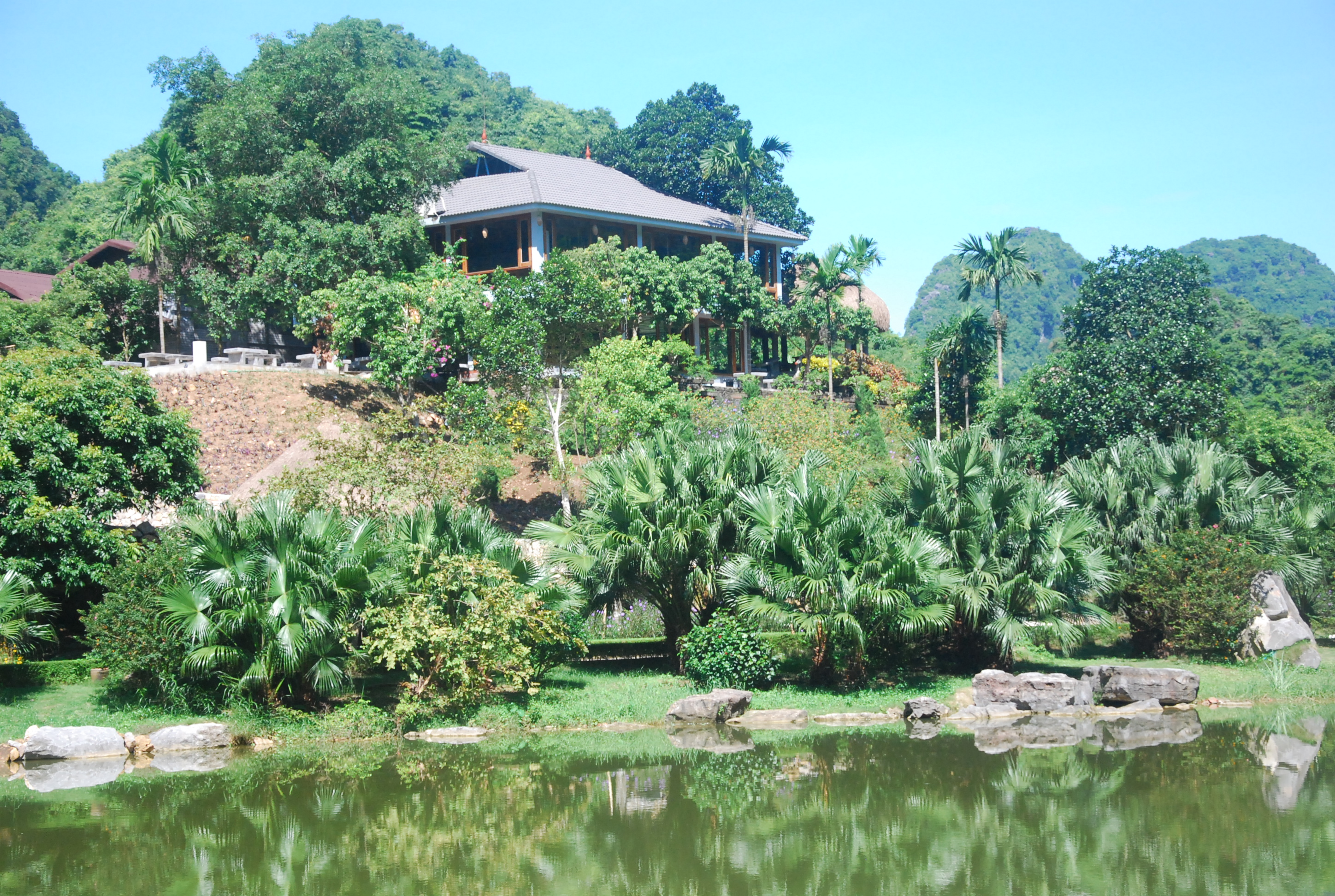 Phong cảnh Khu du lịch sinh thái Thung Nham ở Ninh Bình